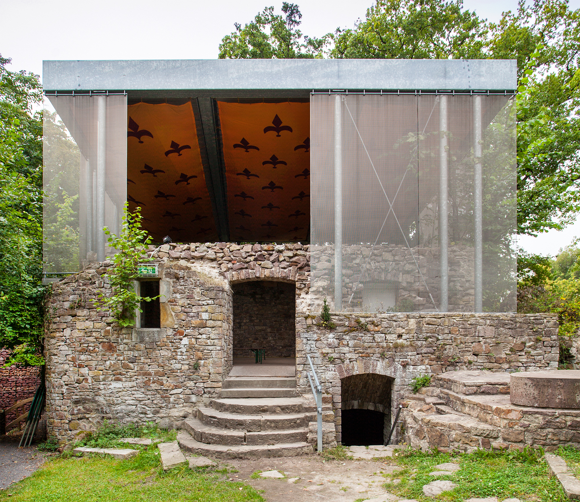 Burgruine in Vlotho auf dem Amtshausberg (Ein Teil der Ruine wurde mit einem Schutzdach versehen)This is a photograph of an architectural monument.